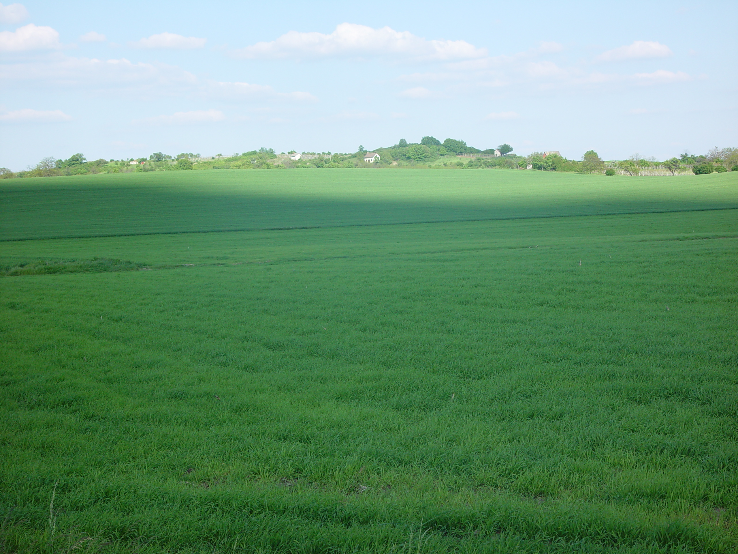 Őszibúza tavasszal (Magyarország)